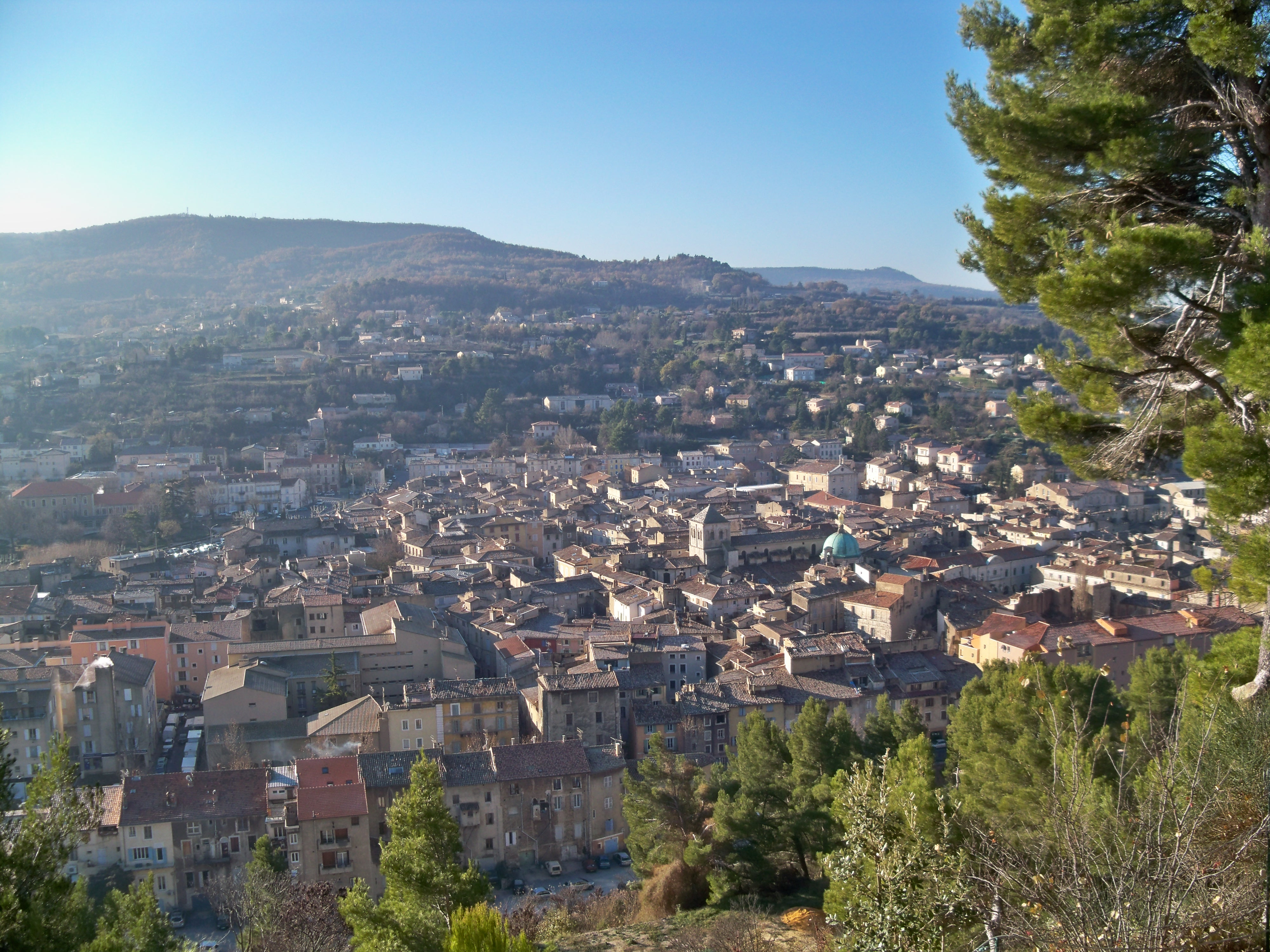 Vue sur la ville d'Apt, Vaucluse, France